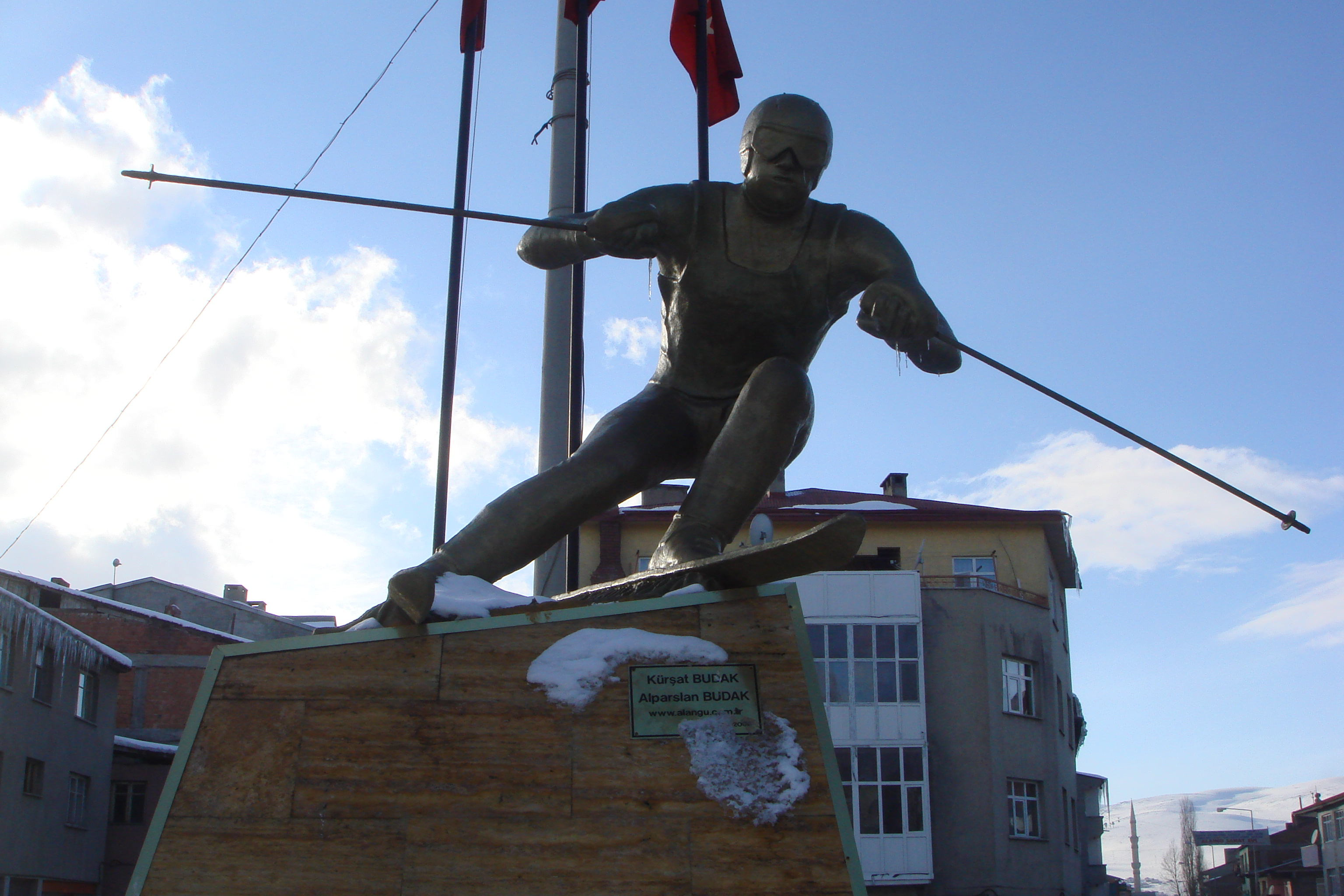 Турция, ил Карс, город Сарыкамыш, памятник Лыжнику